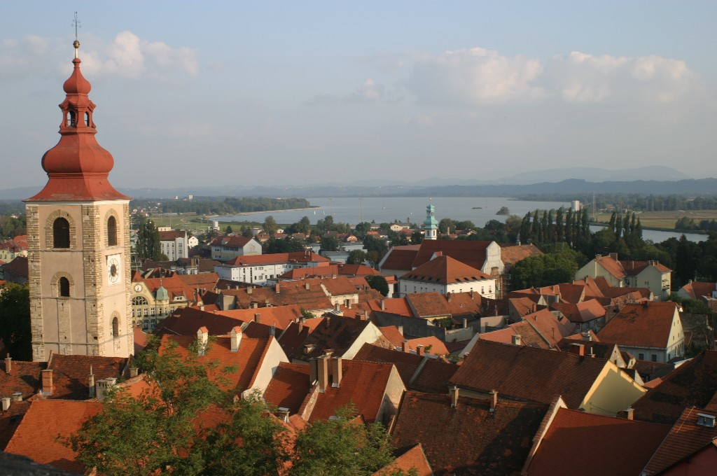 Ptuj s Ptujskim jezerom v ozadju, pogled s Ptujskega gradu.